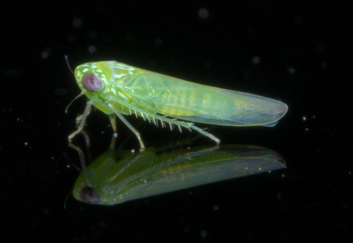 Empoasca fabae, potato leafhopper